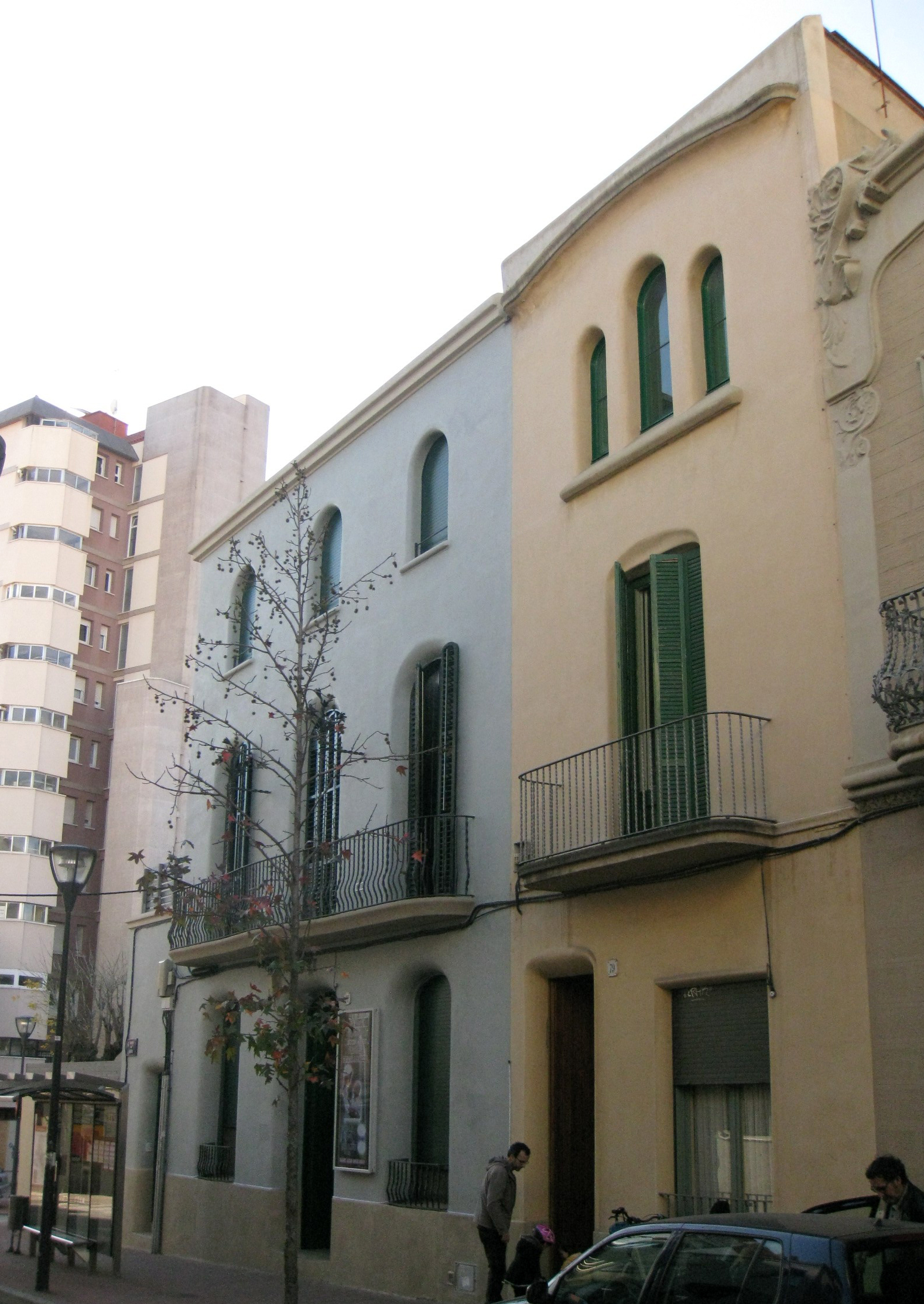 Cases d'Ignasi Escudé, de Lluís Muncunill (1905), al carrer del Nord núm. 77-79 (Terrassa). Edificis modernistes adossats l'un al costat de l'altre, construïts en un mateix estil.